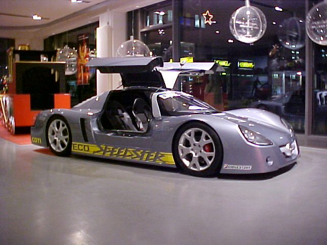 Opel Eco Speedster Concept, auf der Mondial de l’Automobile 2002 vorgestellte Studie eines Rekordfahrzeuges mit Dieselmotor.